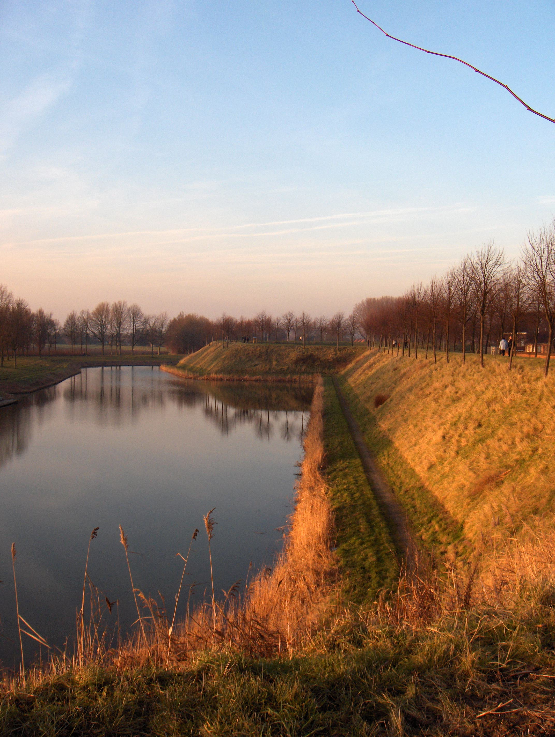 Beschreibung: Hulst (Niederlande, Prov. Zeeland), Stadtbefestigung (1. Hälfte des 17. Jh.s). Datum: 15. Januar 2006 Fotograf: Friedrich Tellberg